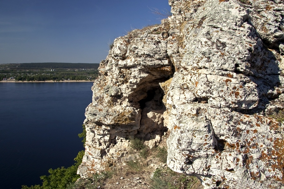 Жигулёвские горы